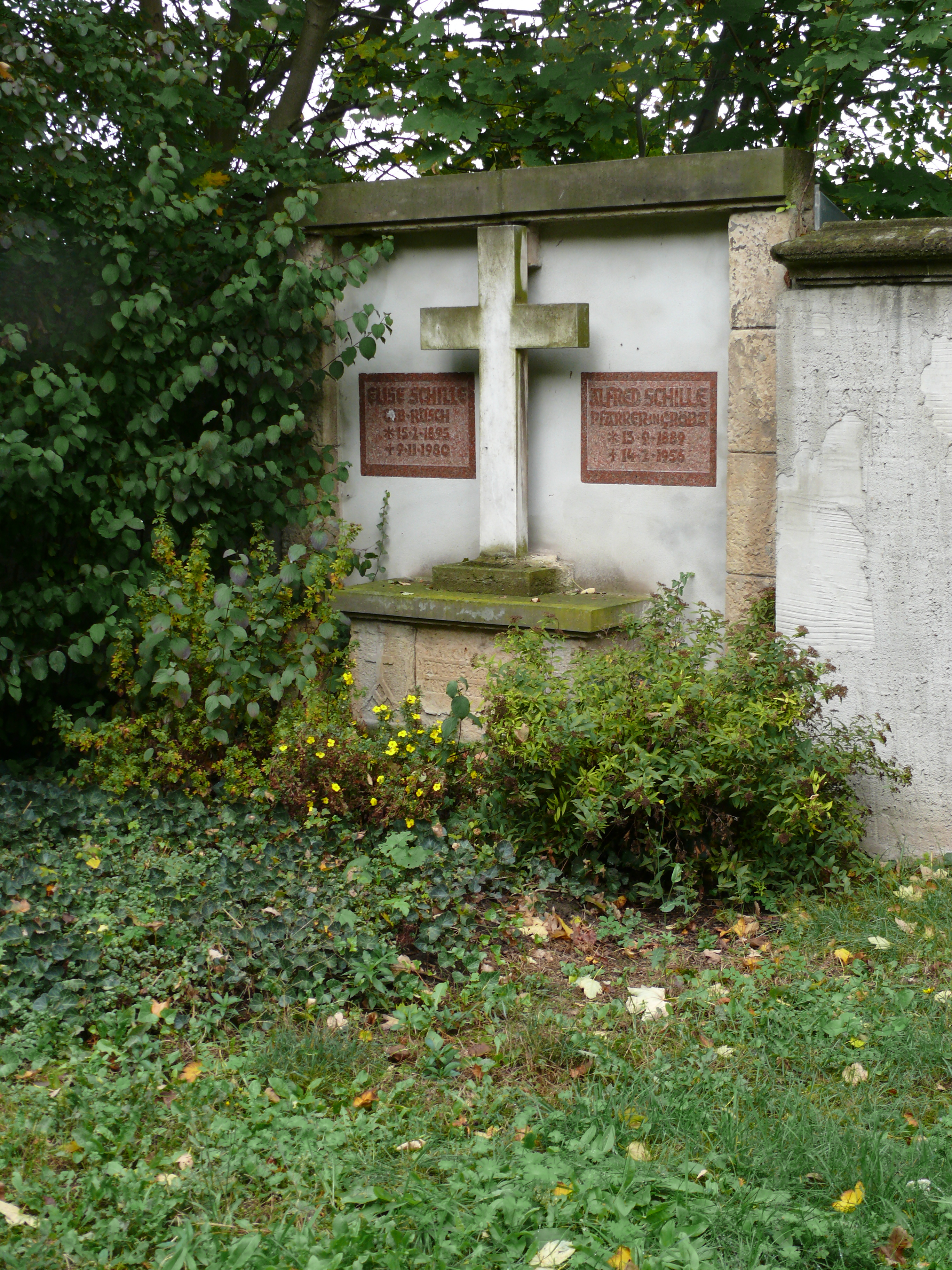 Grab Elise Schille, geb. Rösch (1895-1980) und Alfred Schille, Pfarrer in Gröba (1889-1956)